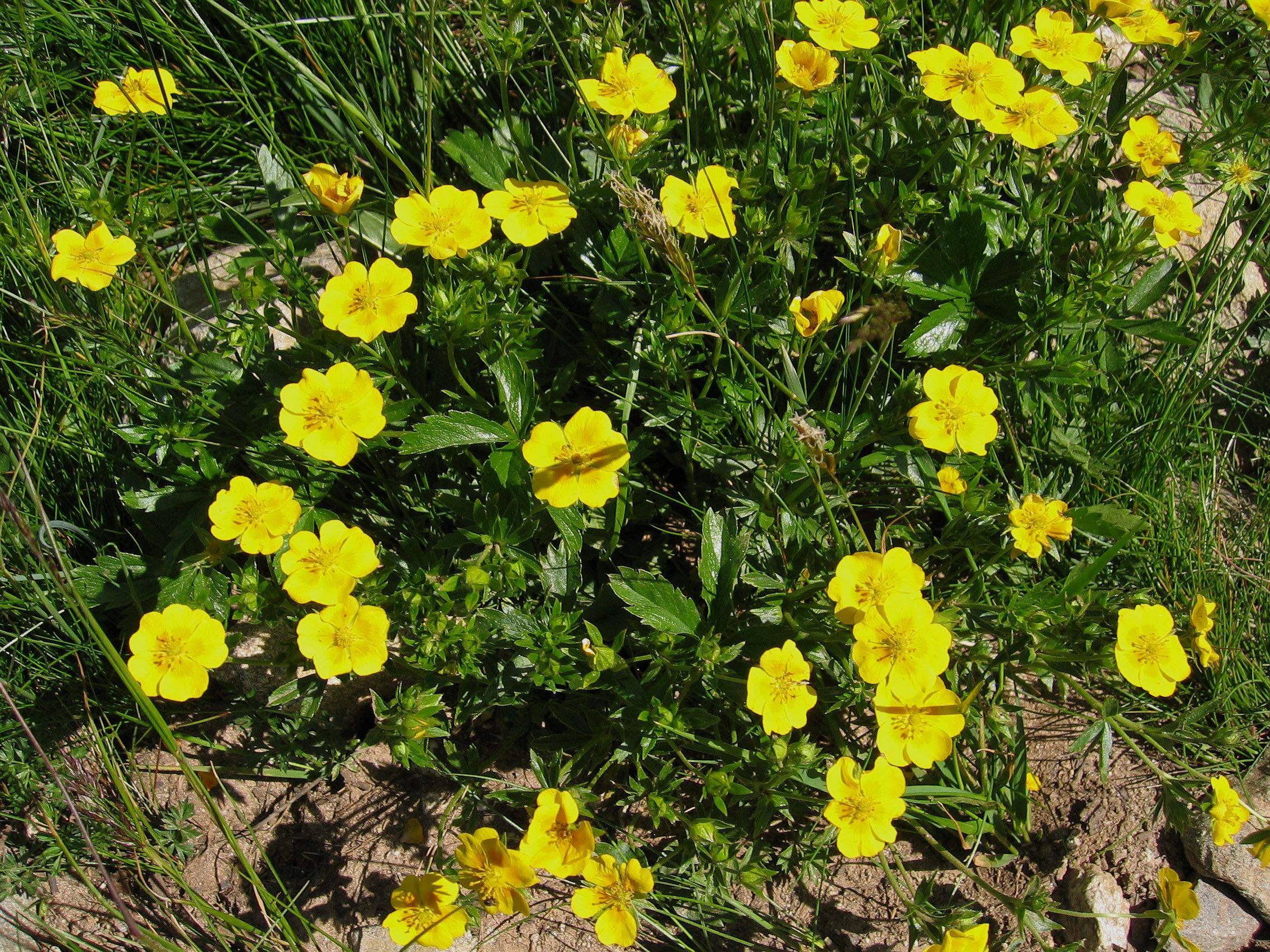 Potentilla_aurea, Großer Bösenstein, Styria, Austria